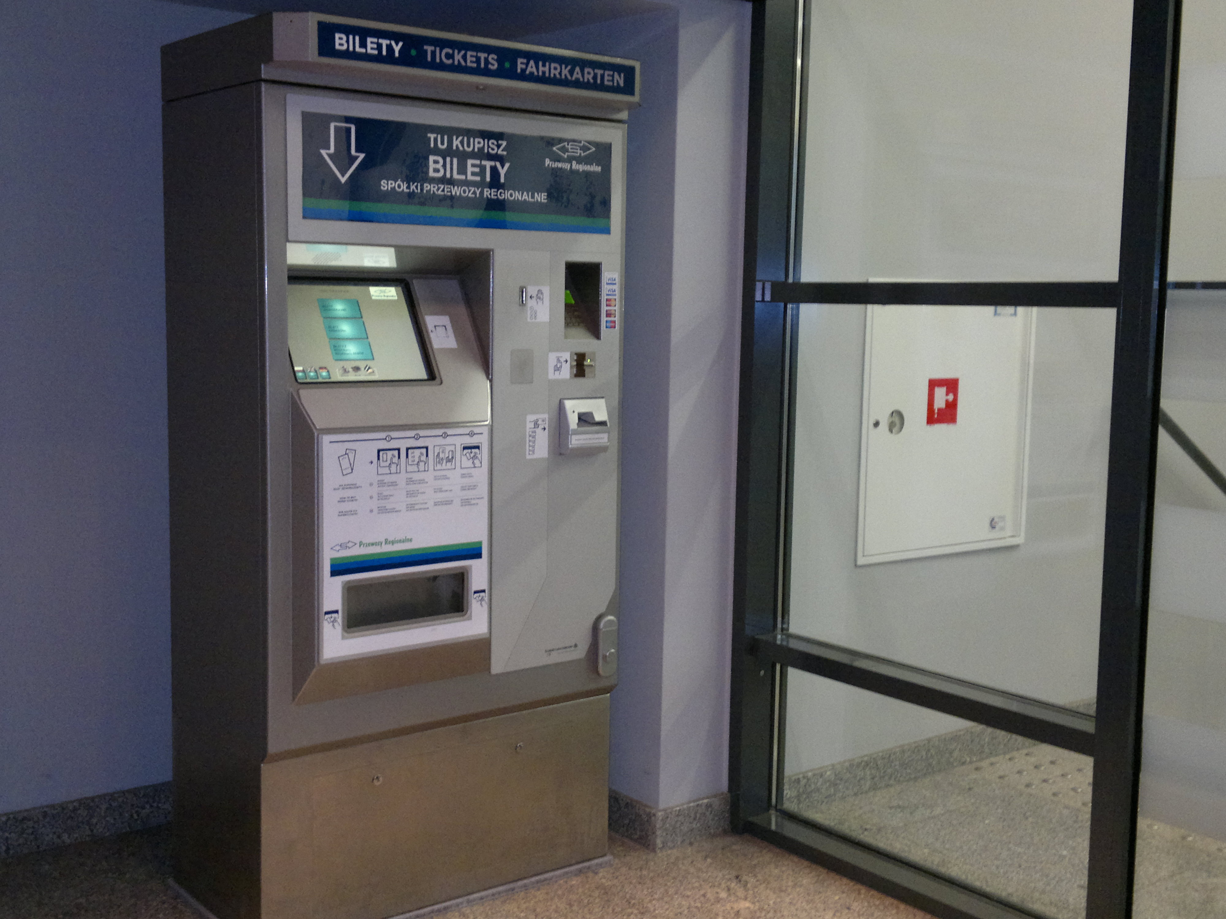 Hall dworca po modernizacji